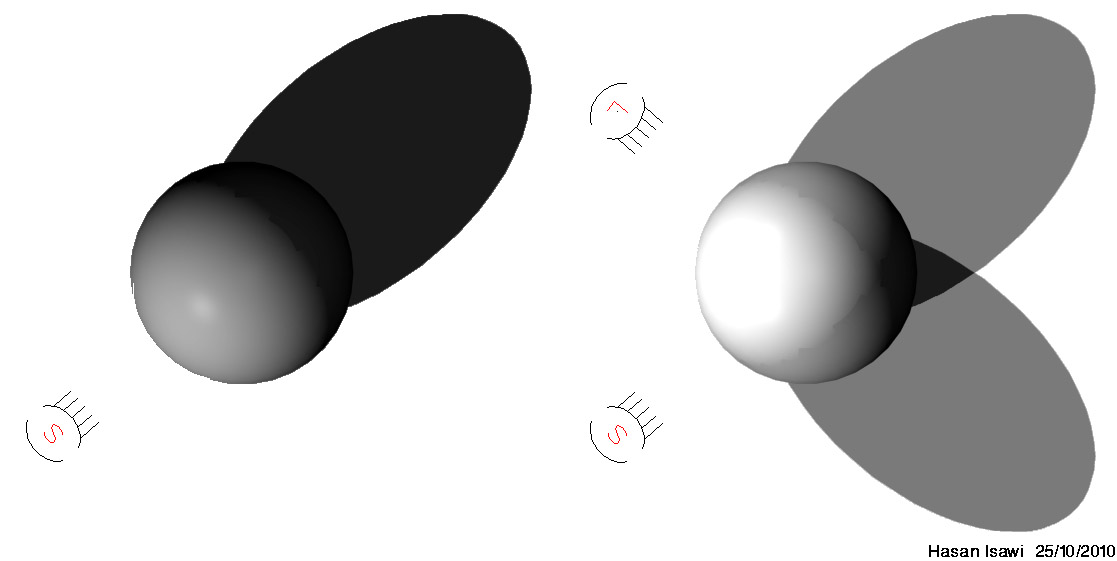 Teoria delle ombre. Capita spesso che un oggetto riceve luci da più sorgenti di luce, in tal caso, alcuni zone di quel oggetto ricevono luce da tutte le luci, altre da uno, ed altre ancora da nessuna.